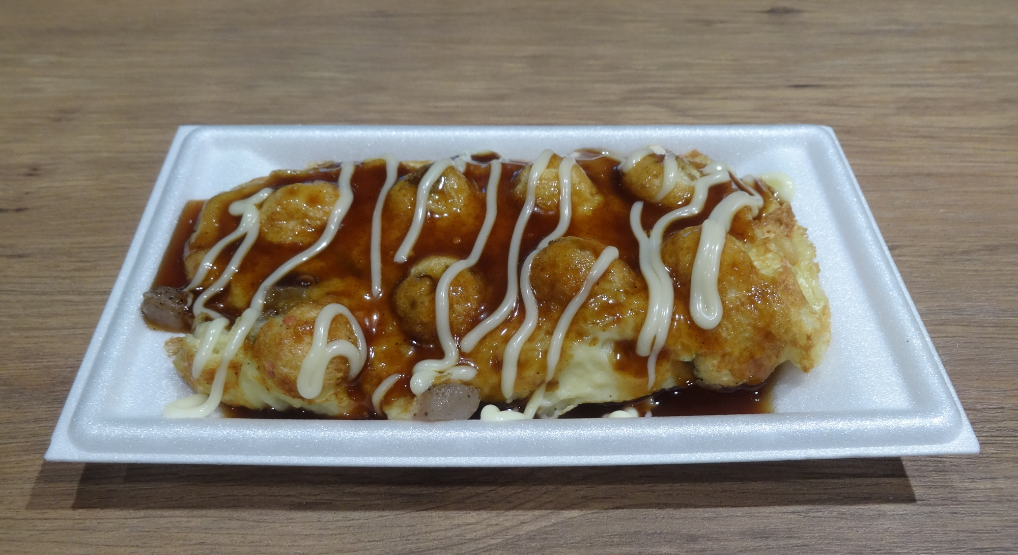 元祖ちょぼ焼本舗 阪神梅田本店のちょぼ焼き（阪神百貨店 スナックパークより撮影）